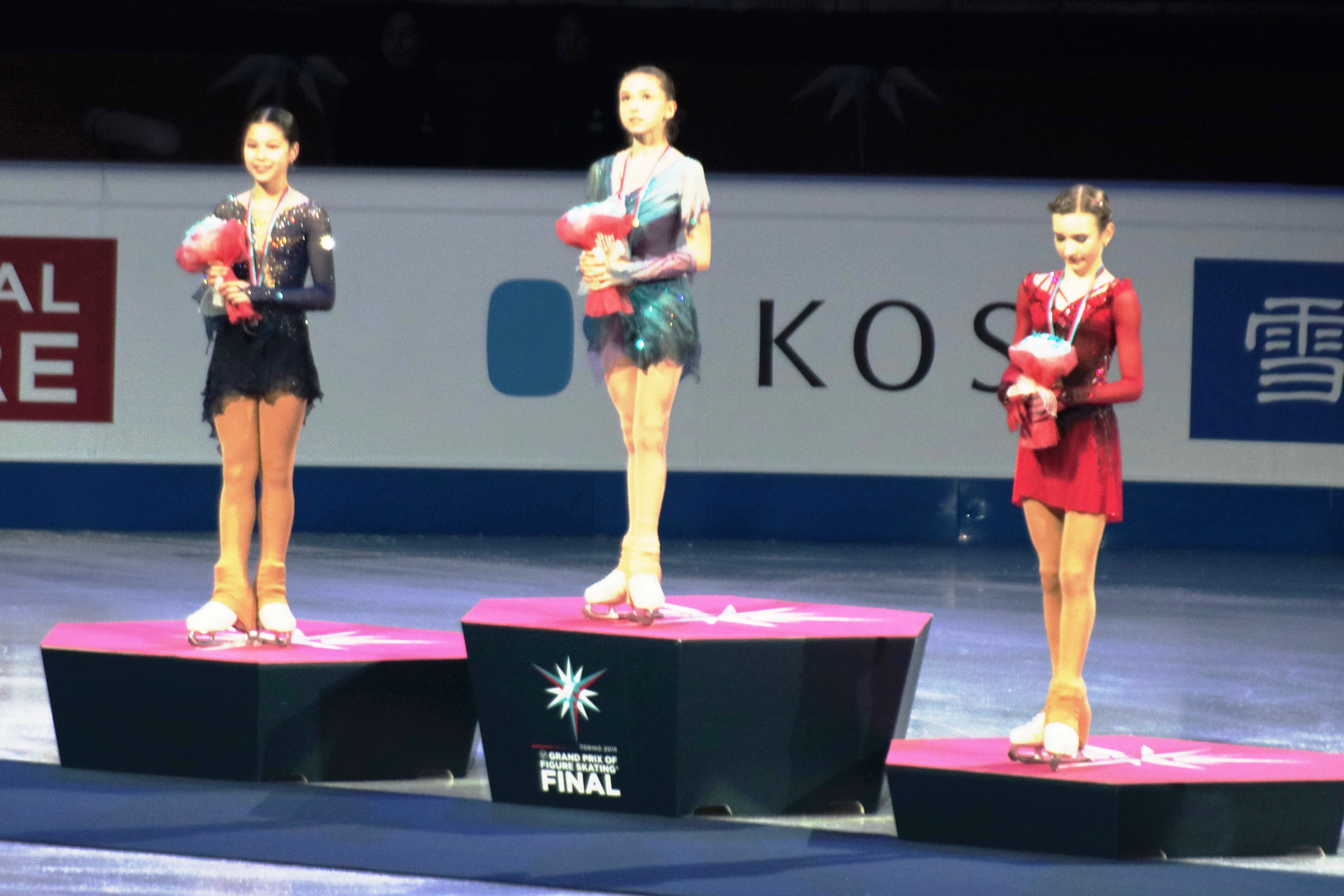 Церемония награждения в женском одиночном катании на финале юниорского Гран-при 2019-2020